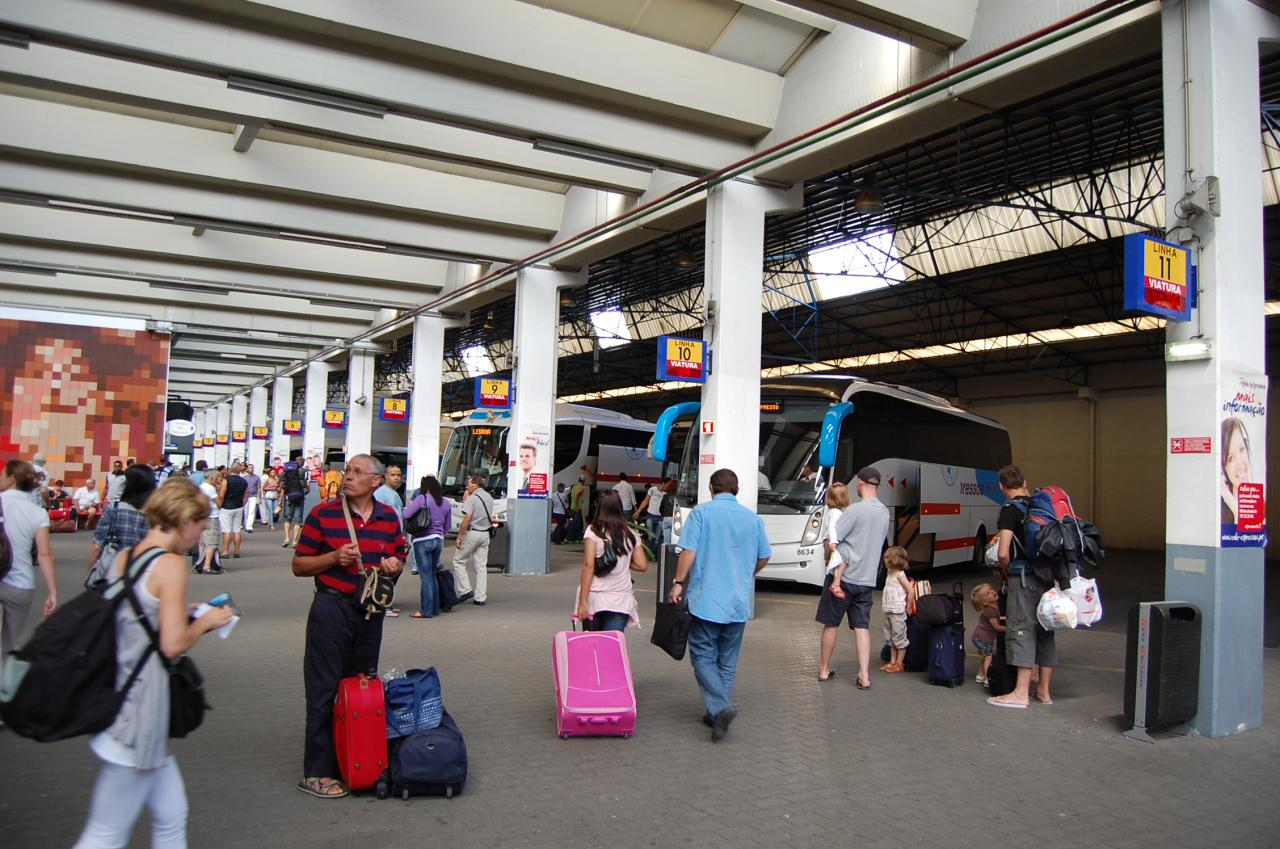 Sete Rios Bus Terminal Lisbon